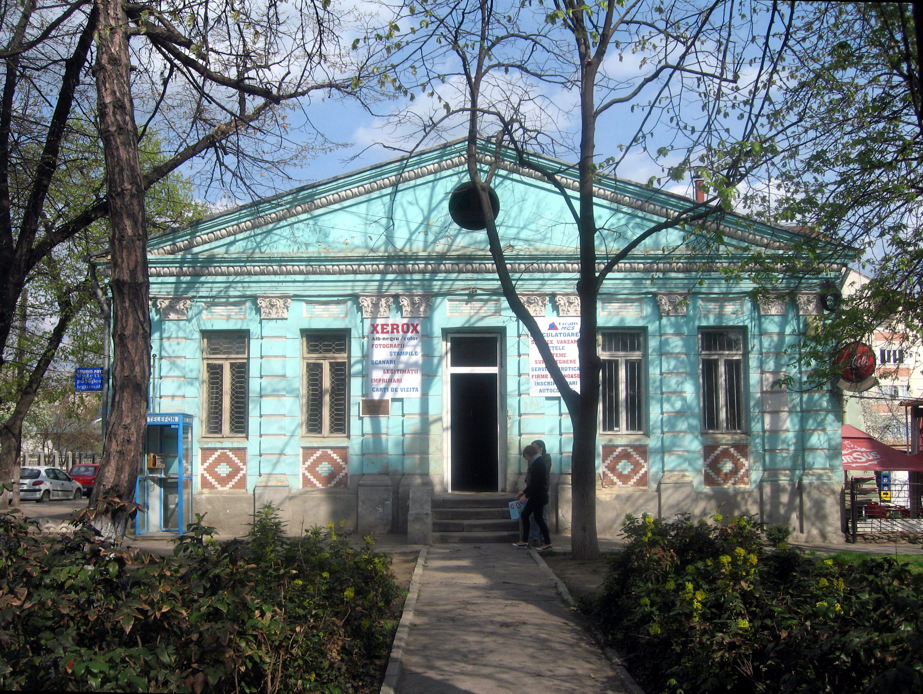 Casa de Cultură din Huși.